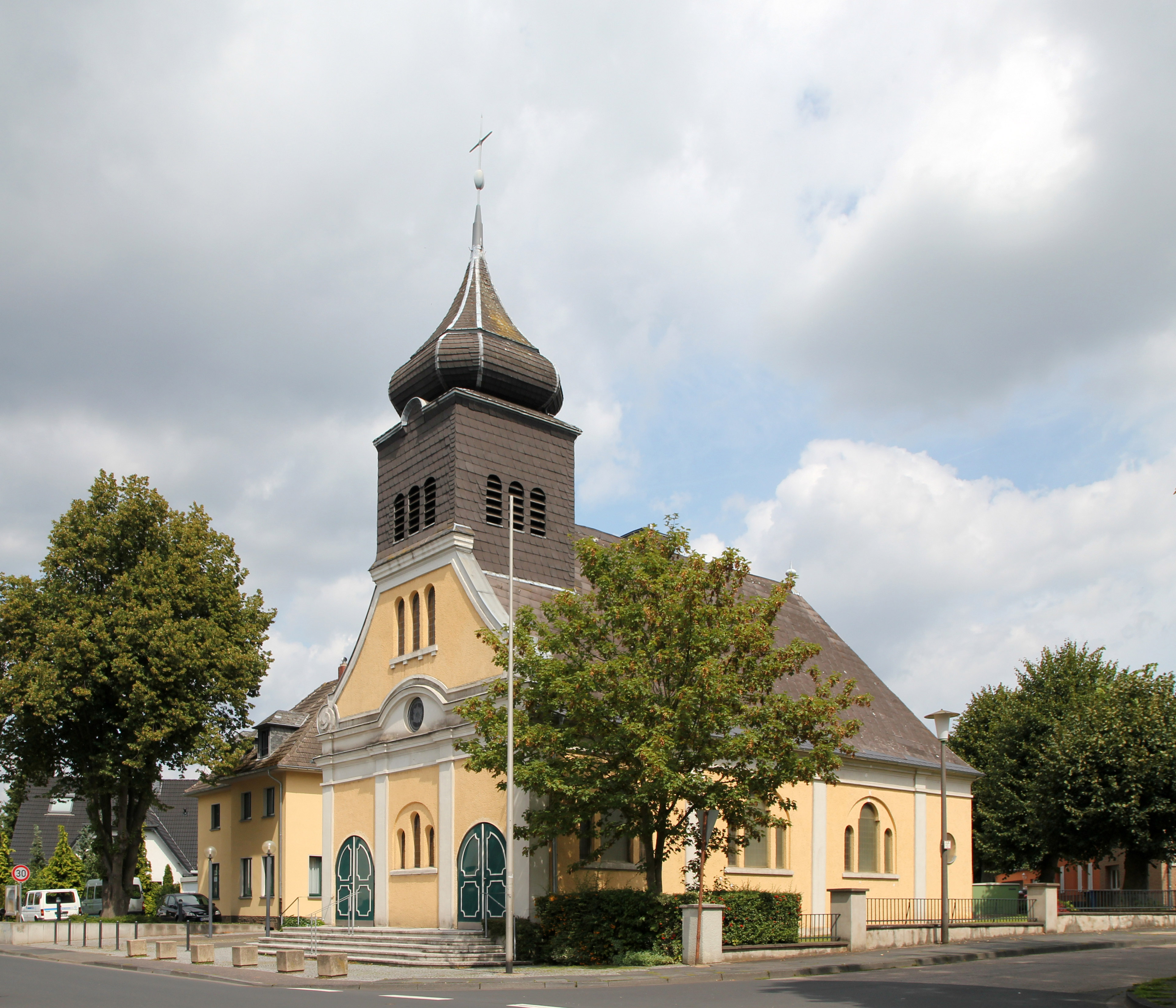 Erftstadt-Liblar, evangelische Friedenskirche